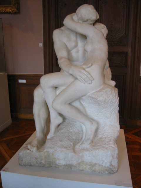 Auguste Rodin (Français, 1840-1917): Le Baiser, Musée Rodin, Paris, France.